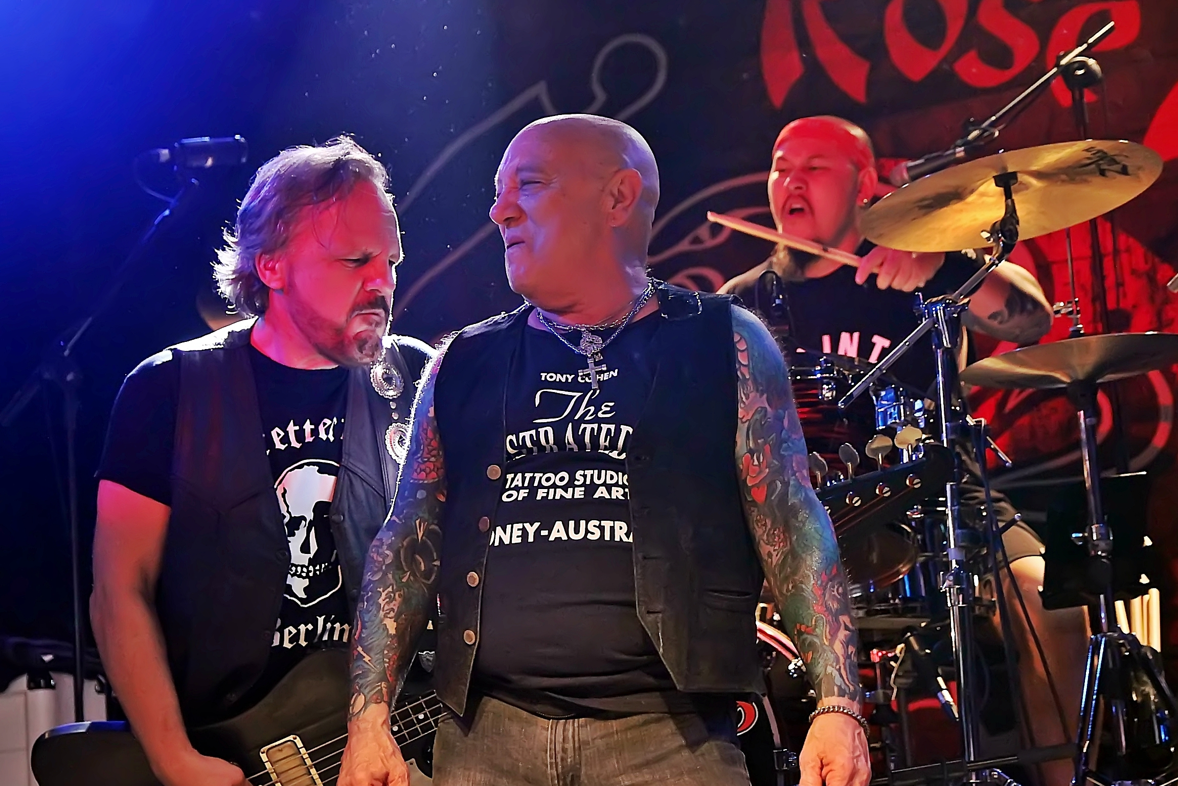 Rose Tattoo bei einem Konzert in Nürnberg im August 2018